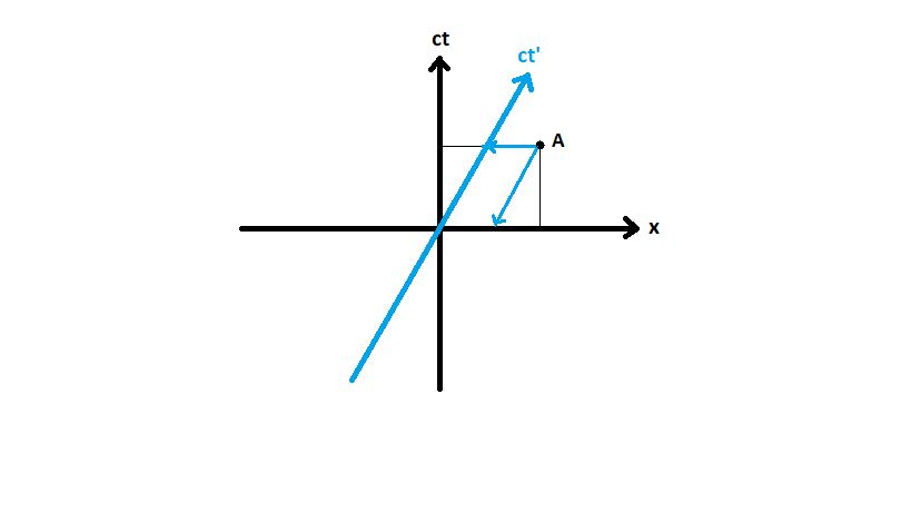 תרשים מינקובסקי עם אירוע A